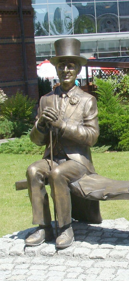 Jeremi Przybora część pomnika Starszych Panów - dzieło Mariana Molendy na wzgórzu uniwersyteckim w Opolu